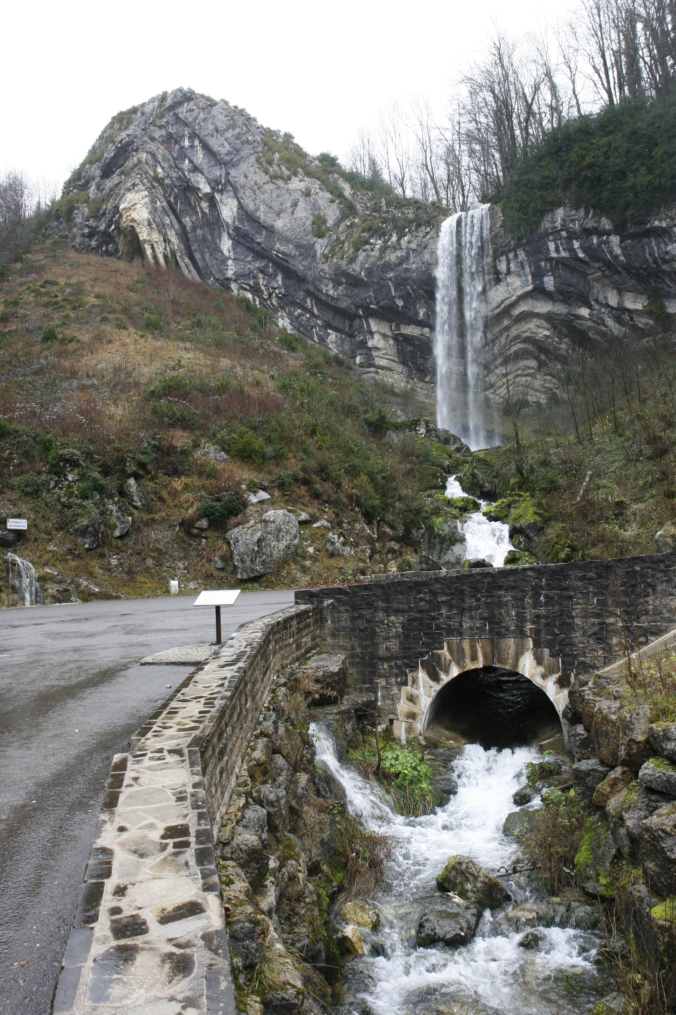 Pli géologique appellé "Chapeau de gendarme" dans les lacets de septmoncel (jura, France)